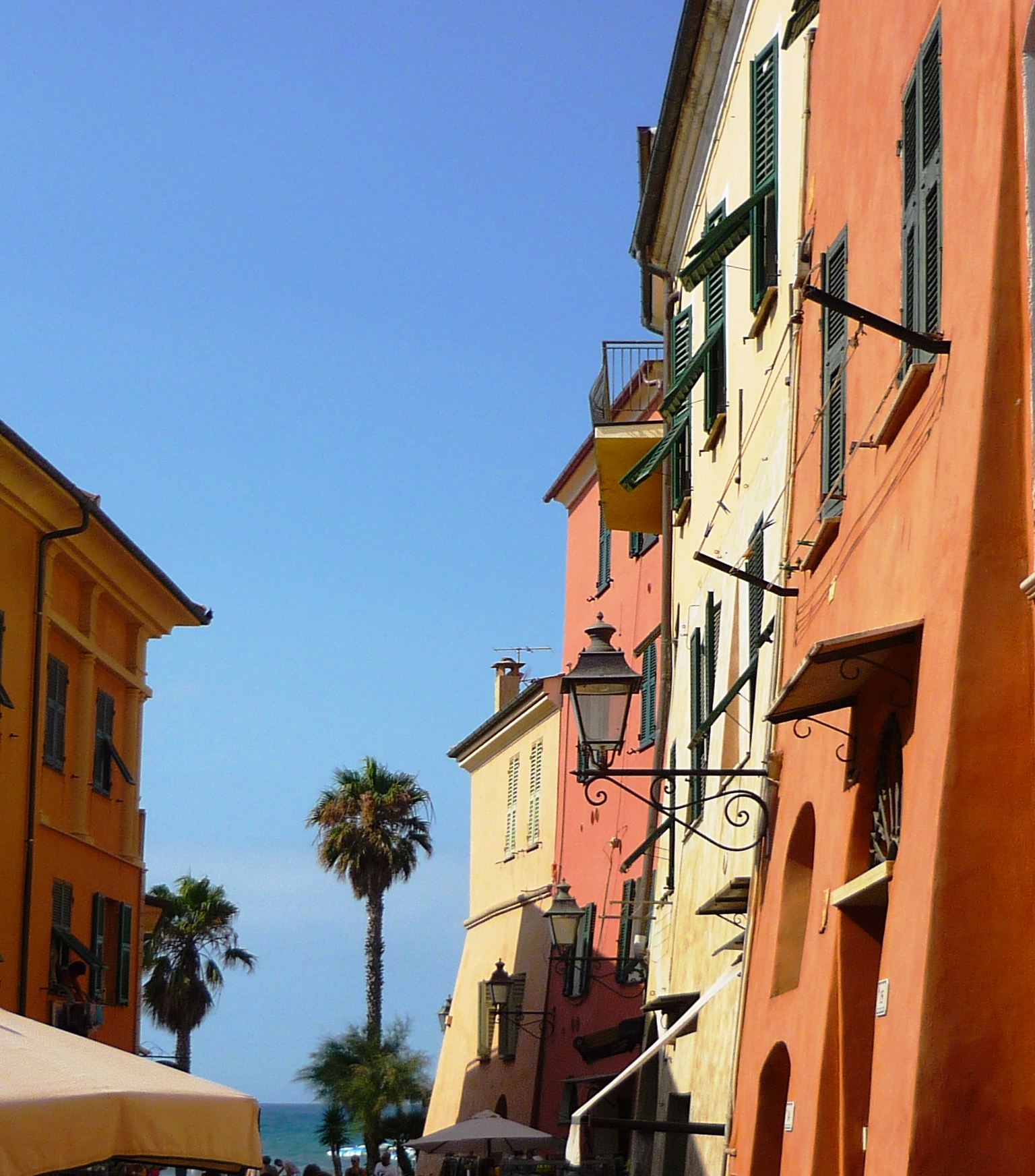 18017 San Lorenzo al Mare IM, Italy